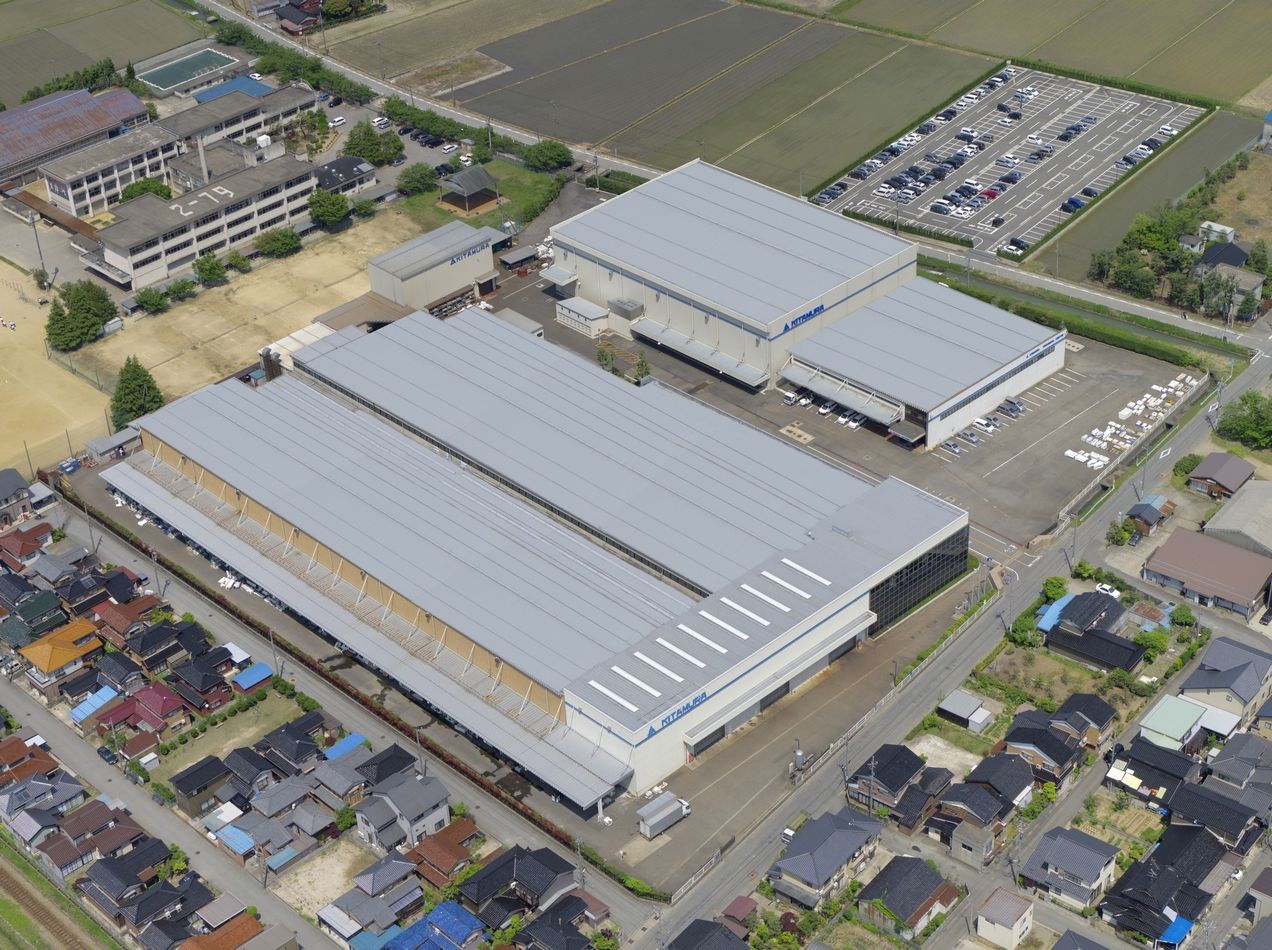 キタムラ機械 外観（航空写真）